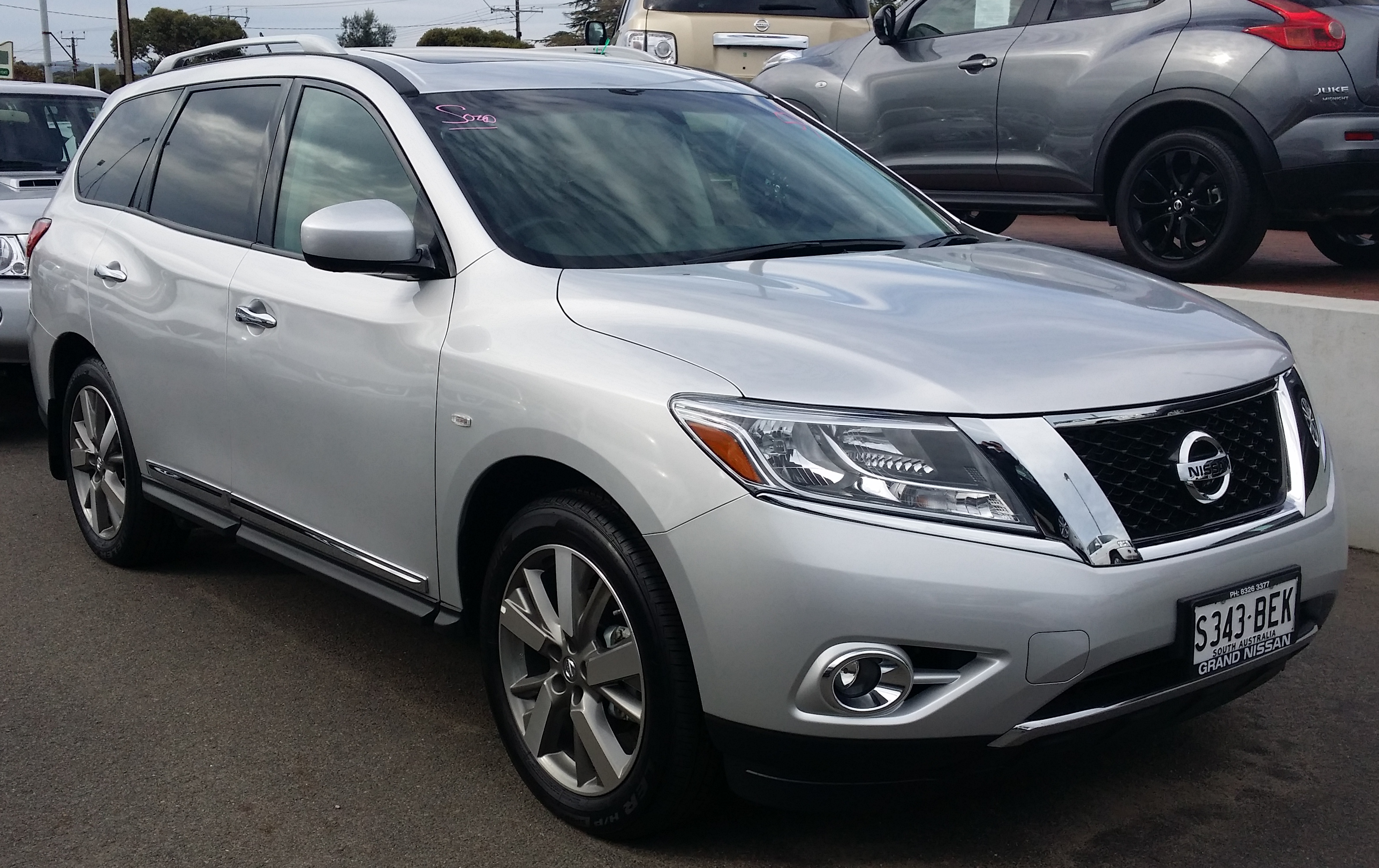 2015 Nissan Pathfinder Ti